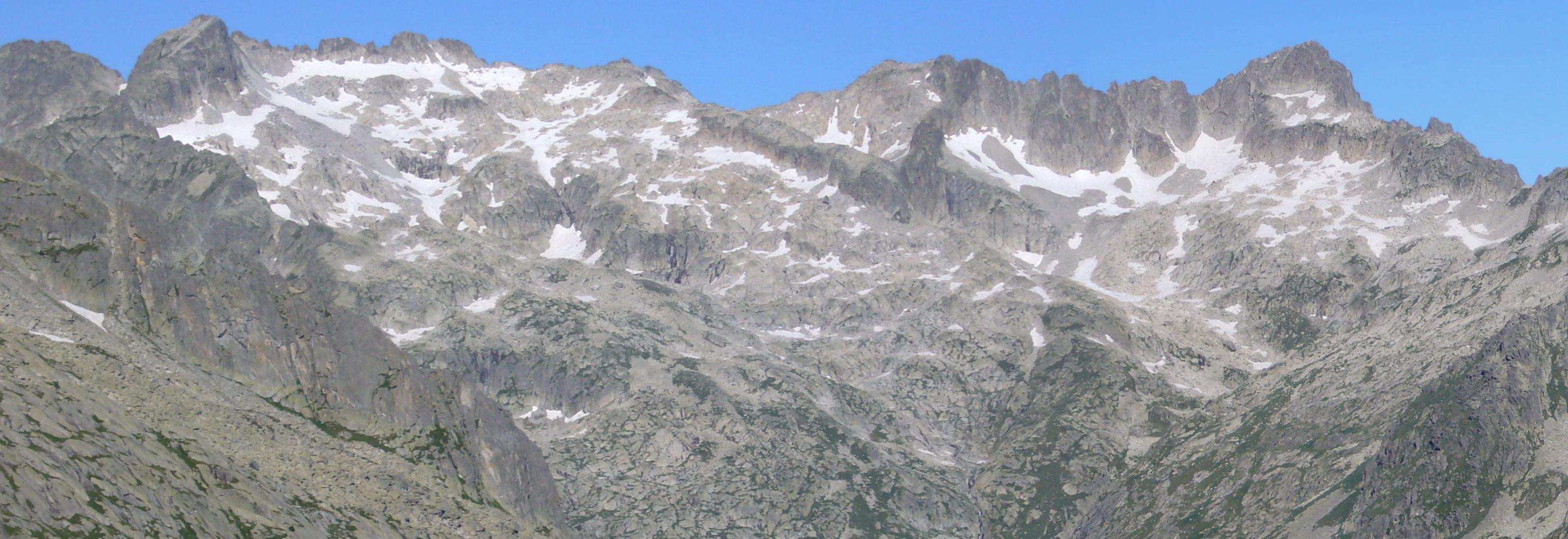 Massís de Besiberri vist des de la Vall de Colieto; Alta Ribagorça, Catalunya